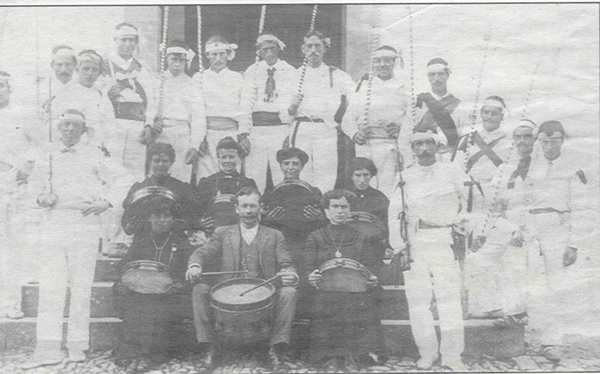 La Danza de las Lanzas de Ruiloba, Cantabria, en el “Día de Santander” en 1925. El tamborilero hermano de la tonadillera María Cruz Morillón. Una de las mozas es la Sra. Avelina González (1893). Foto tomada en la portalada de la casa de Don Iñigo Iriberto, en la Plazoleta del Tejo.